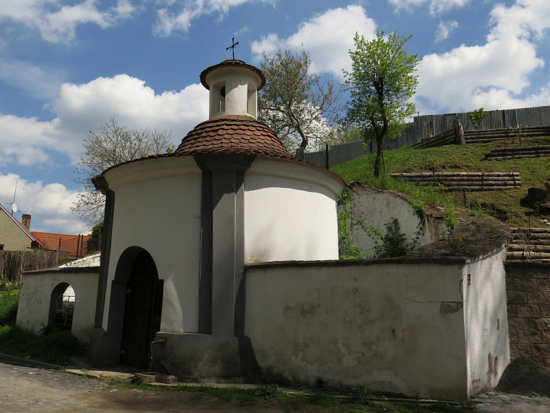 Kaple, nad pramenem, Dolánky nad Ohří.